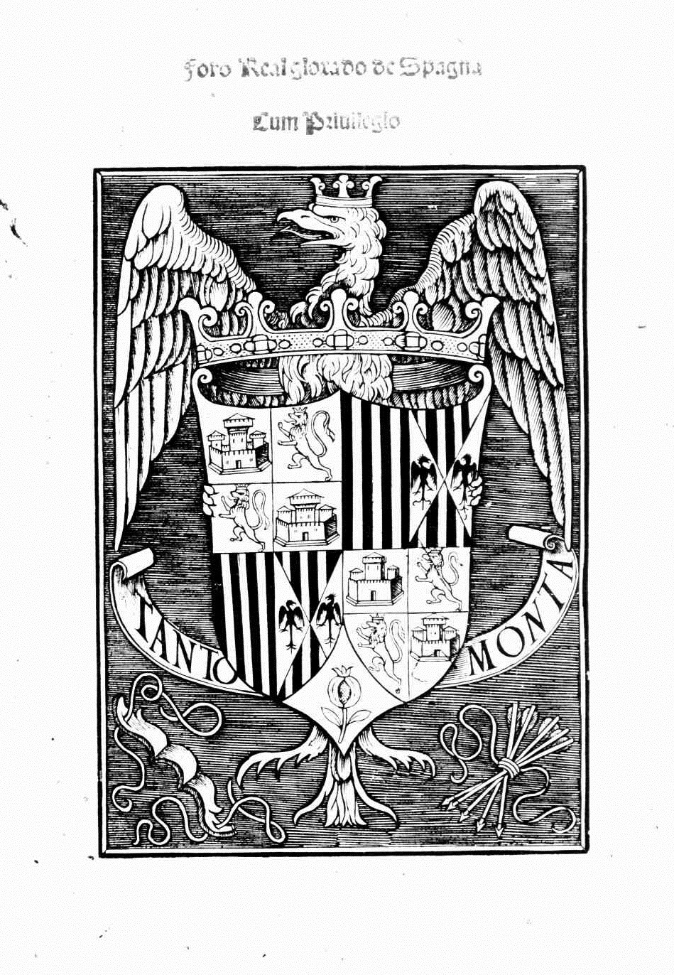 occhietto